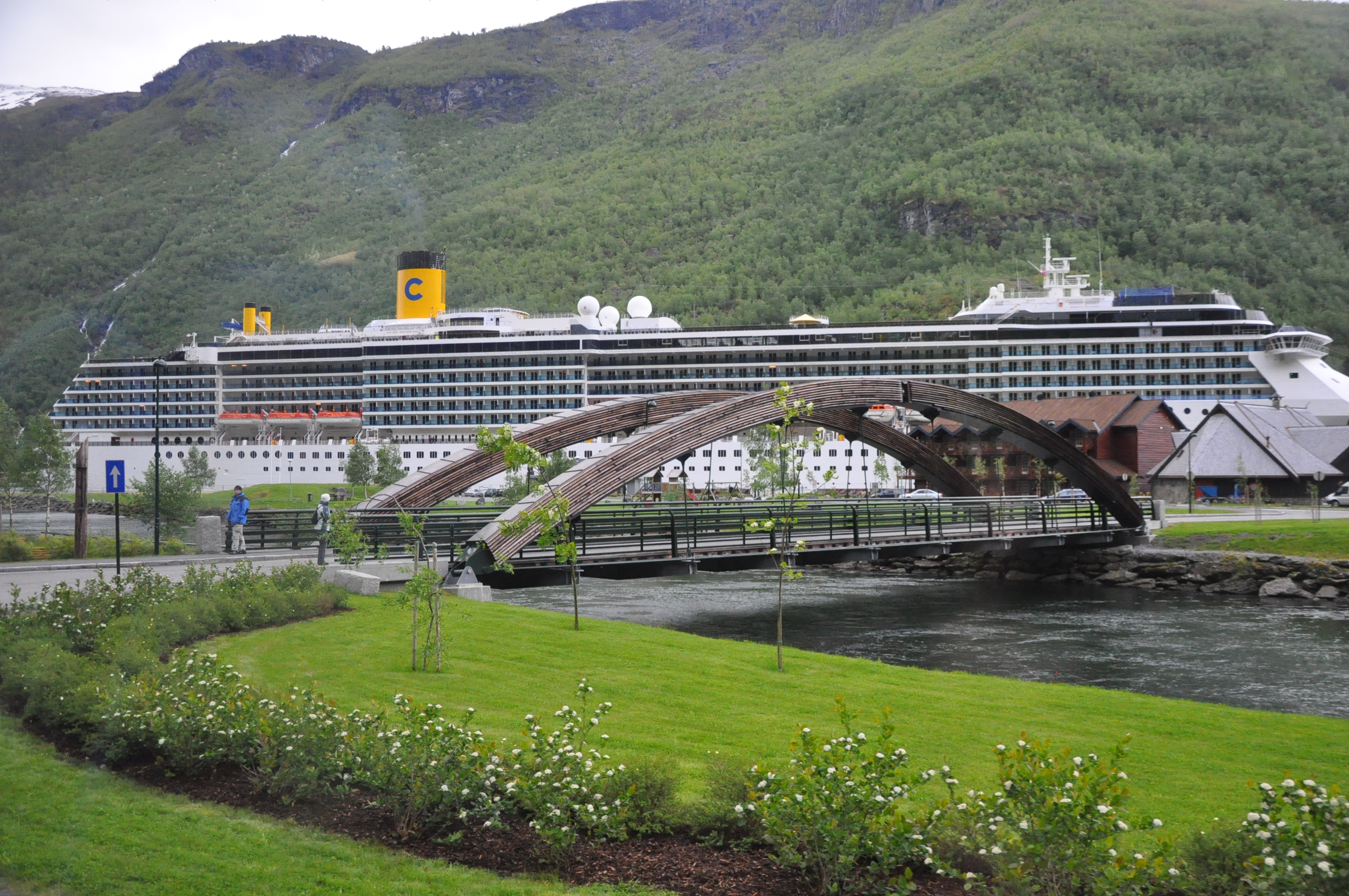 Fretheim bru over Flåmselvi. Costa Atlantica ved kaien i Flåm.